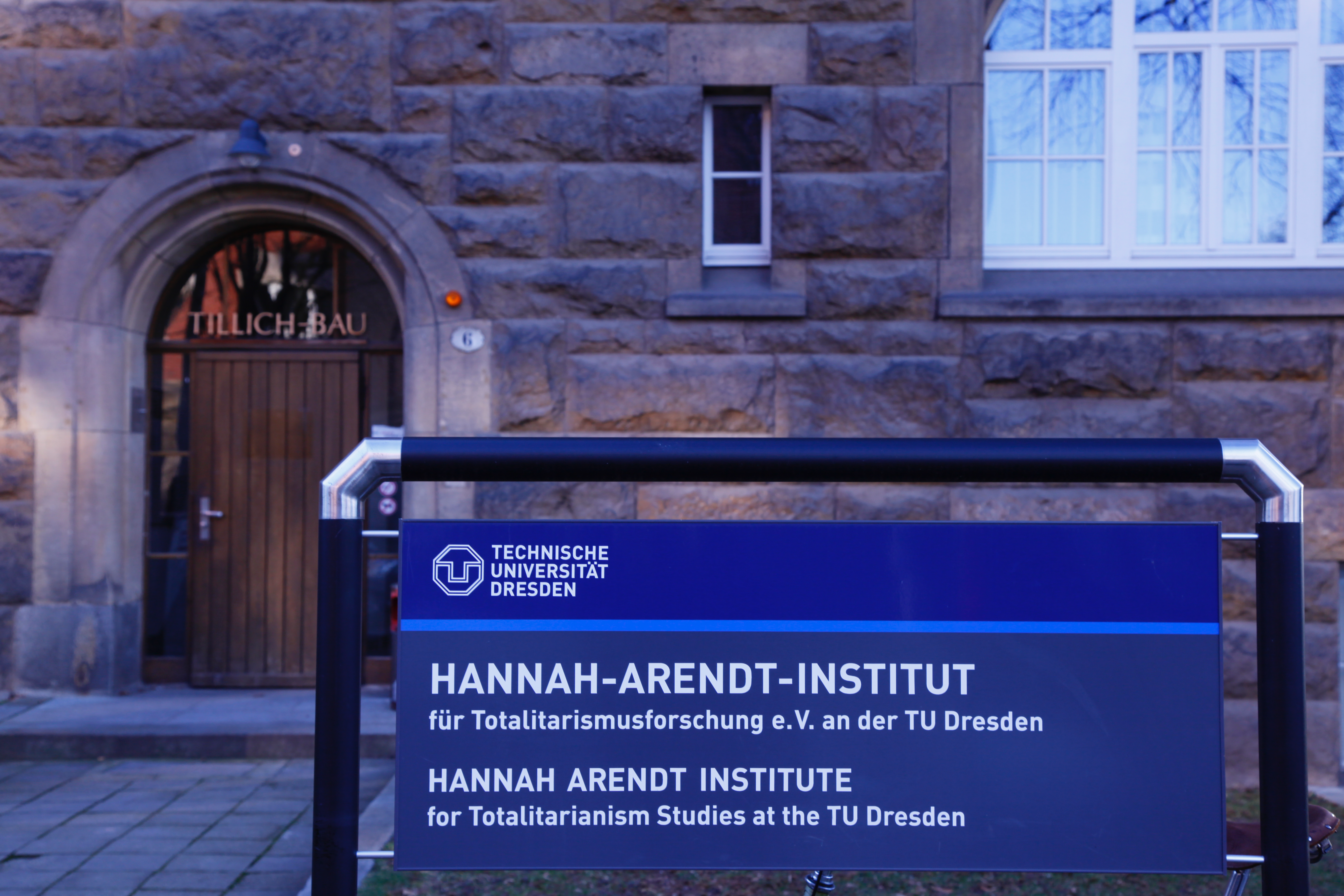 Hannah-Arendt-Institut für Totalitarismusforschung Dresden